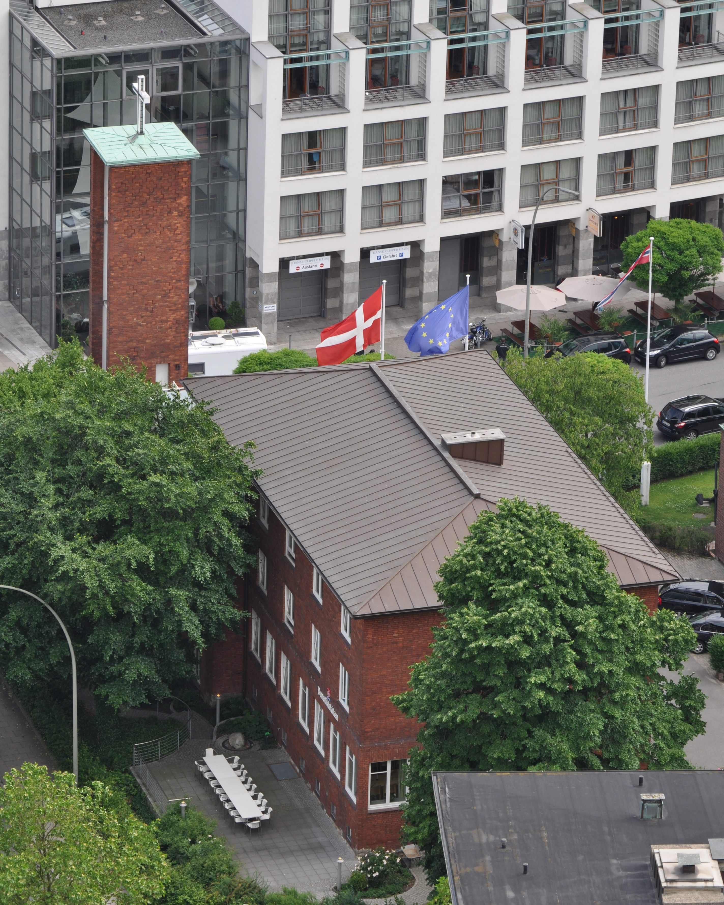 Benediktekirken, dänische Seemannskriche in Hamburg-Neustadt. This is a photograph of an architectural monument.